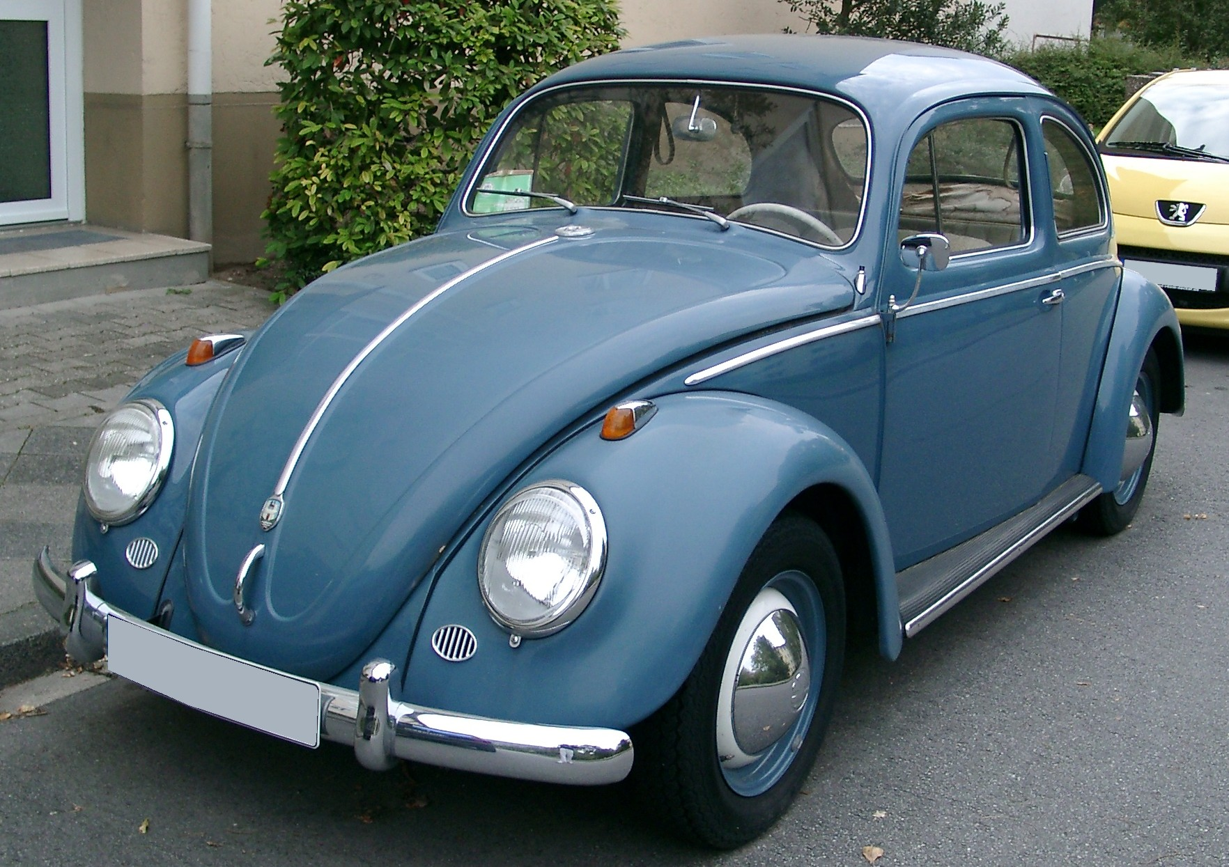 VW Käfer